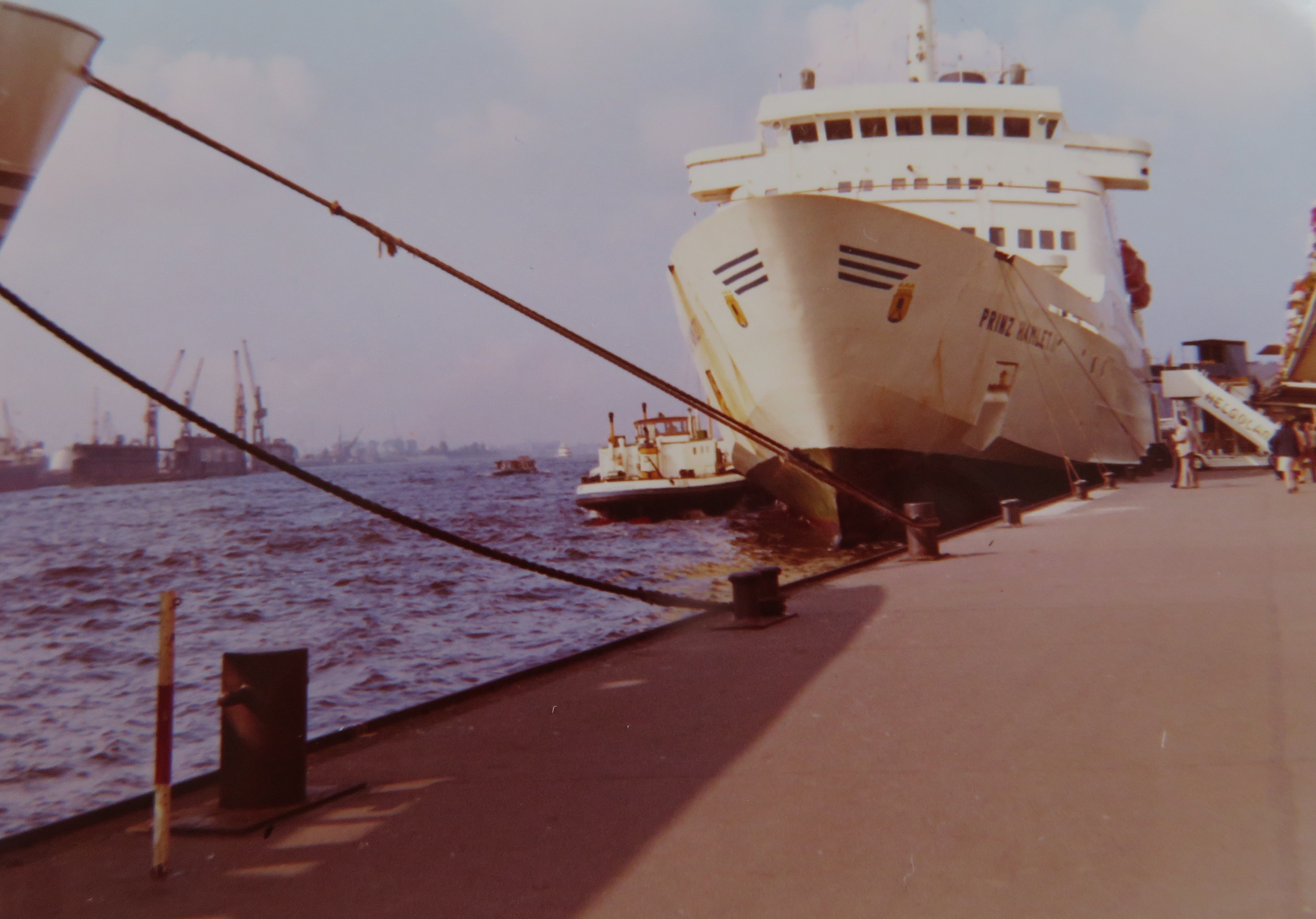 Prinz Hamlet